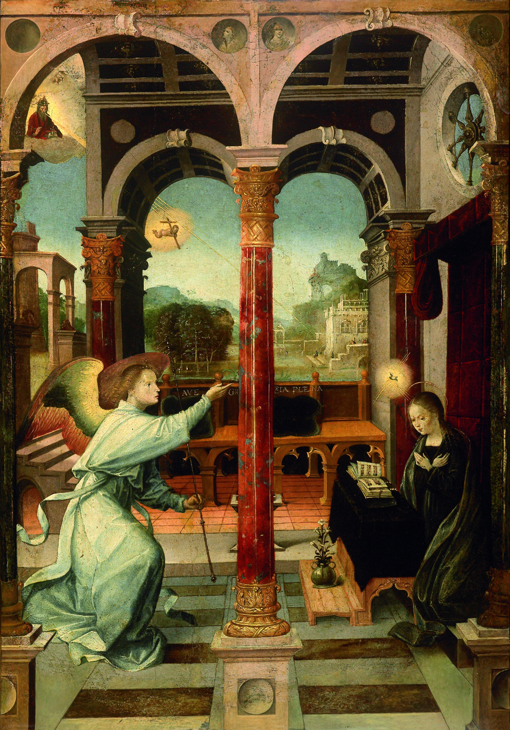 La obra representa el momento en que el arcángel San Gabriel anunció a la Virgen María que sería la madre del Mesías.